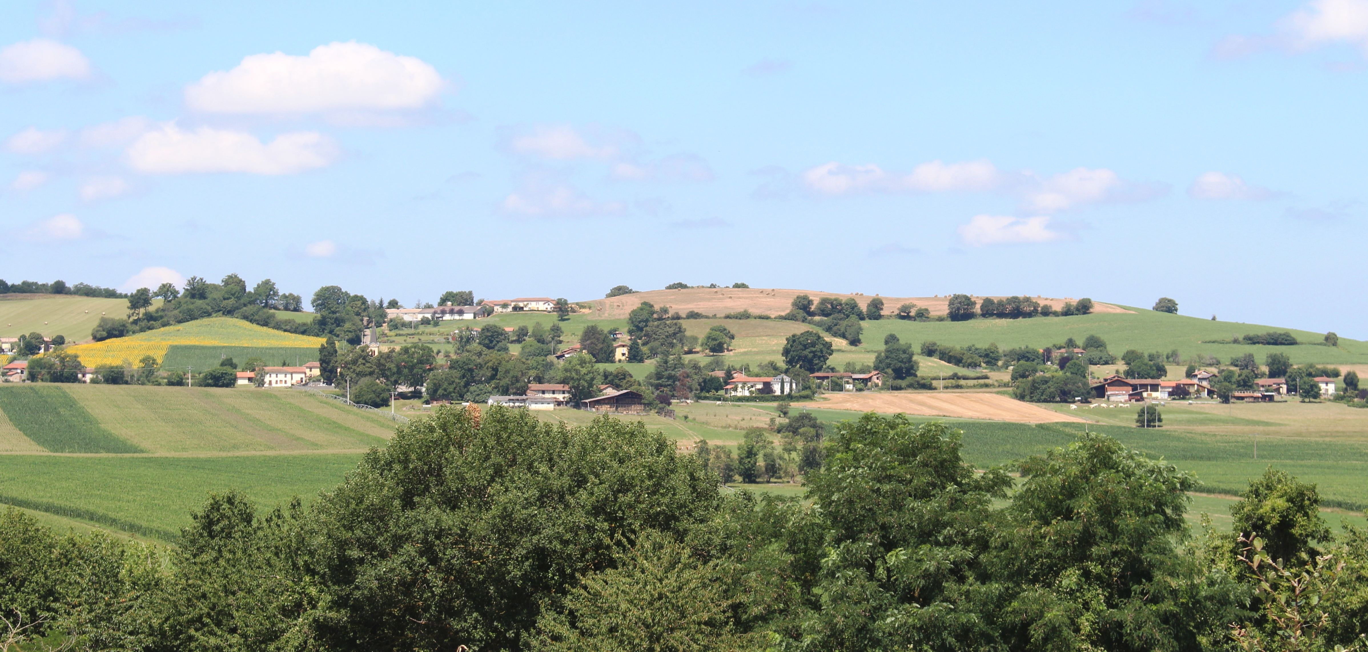 Sentous (Hautes-Pyrénées)